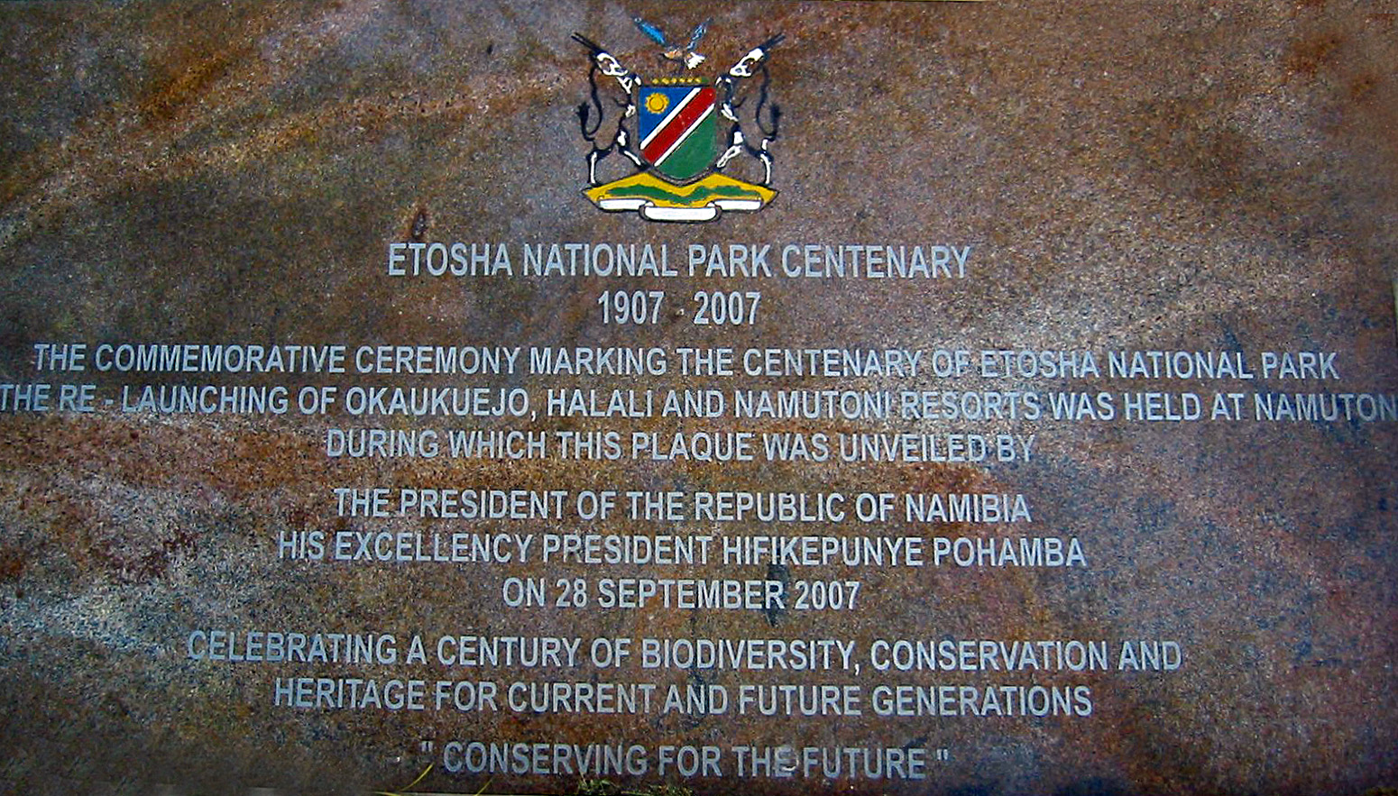 Namutoni, Namibia